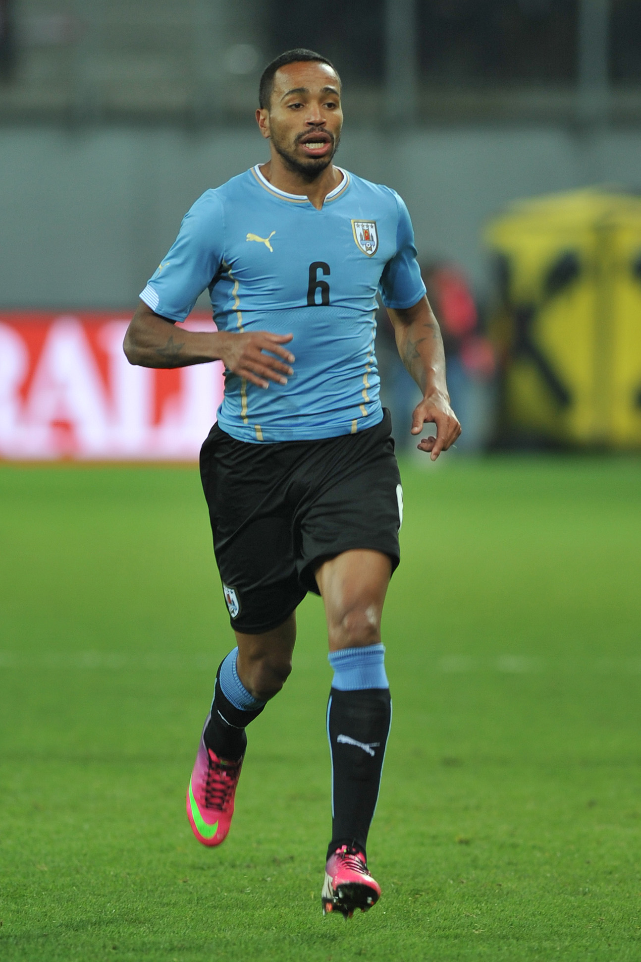 Freundschaftliches Länderspiel Österreich - Uruguay am 5. März 2014 in Klagenfurt: Álvaro Pereira.